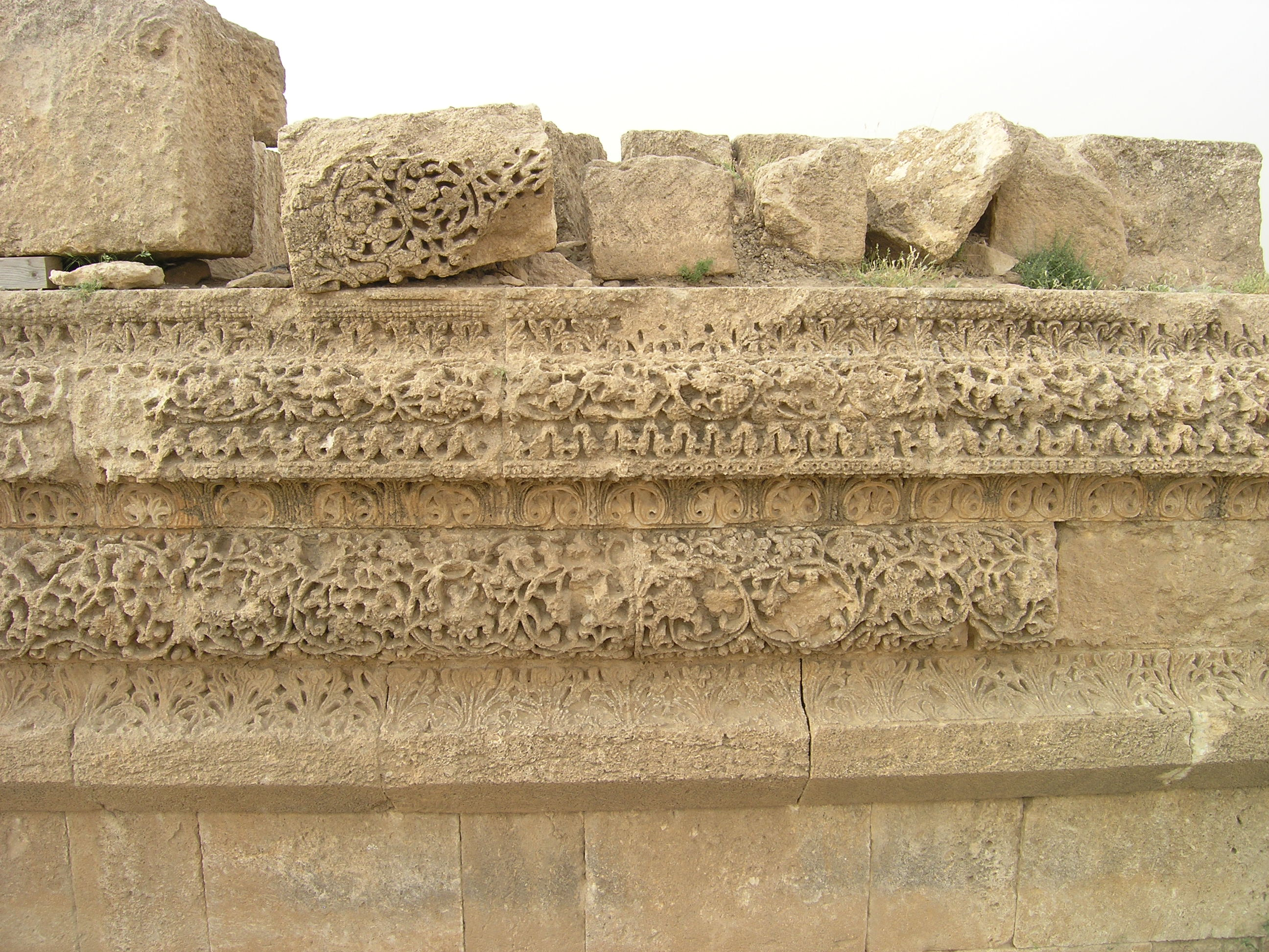 Mshatta - umayyadisches Wüstenschloss in Jordanien. Reste der Fassade.